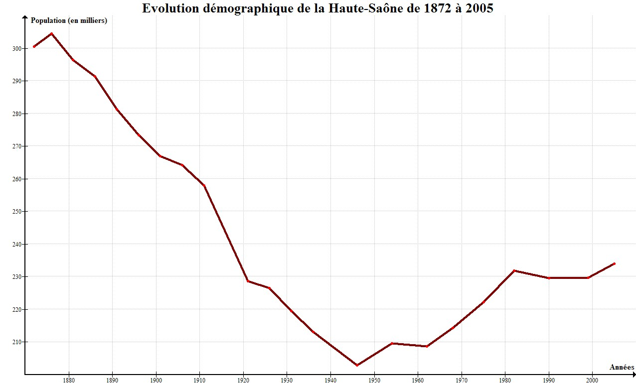 Courbe montrant la croissance de la population du département de Haute-Saône entre 1872 et 2005